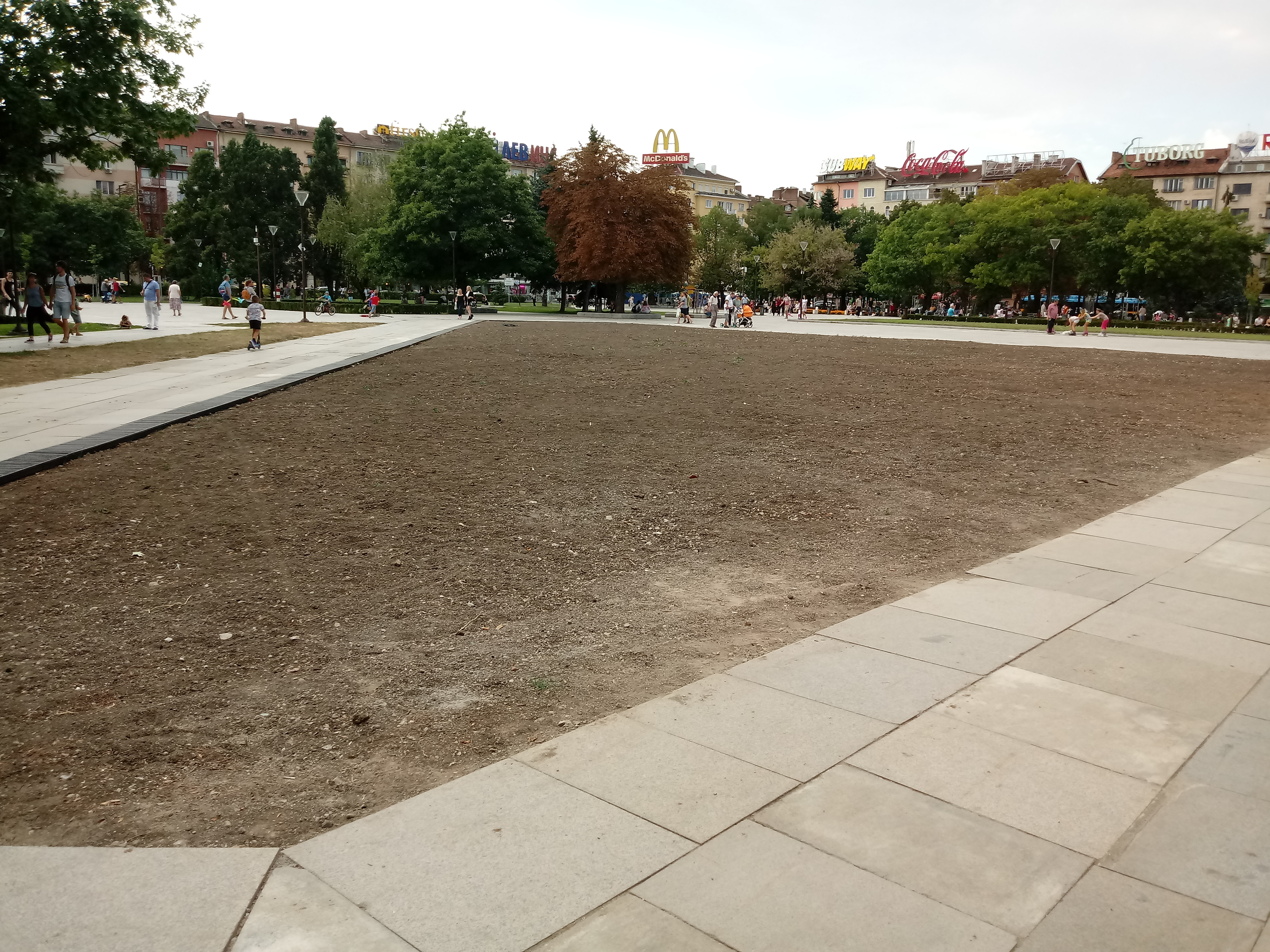 Пространството пред НДК след премахването на паметника "1300 години България" (септември 2017)